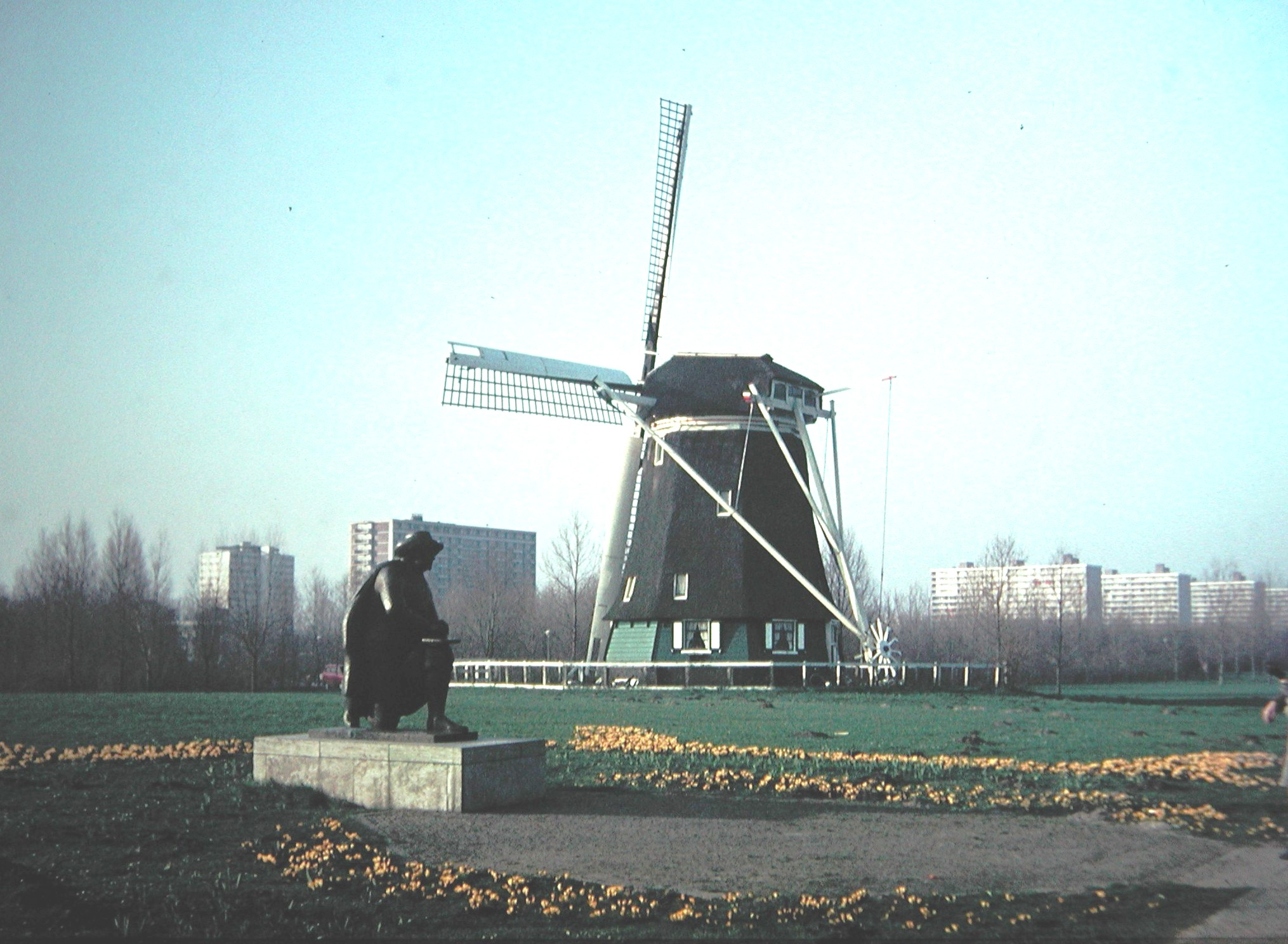 Riekermolen, Amsterdam Object location52° 19′ 26.71″ N, 4° 53′ 37.61″ E